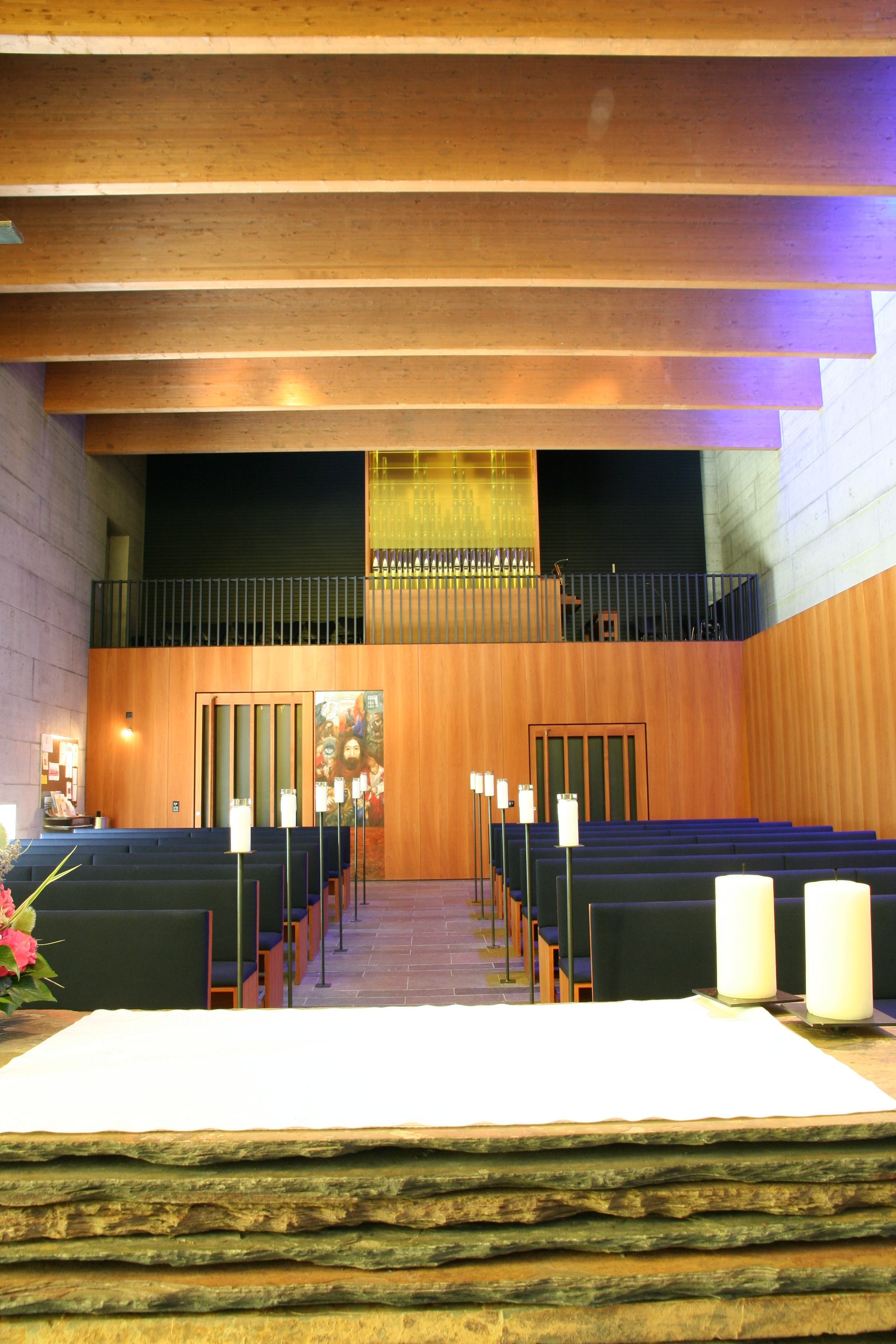 Römisch-katholische Kapelle Bruder Klaus in Wädenswil-Au, Blick zur Orgelempore